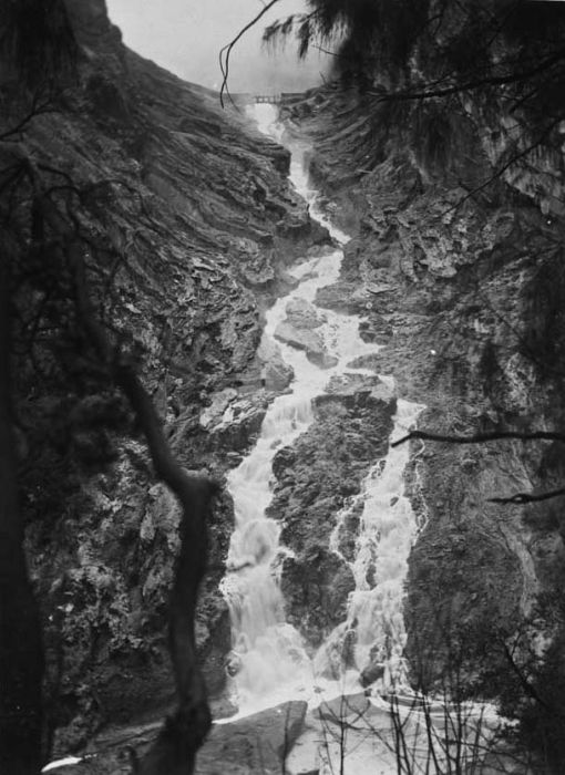 Foto. Waterval van de rivier Banjoepait bij geopende spuisluis, Oost-Java